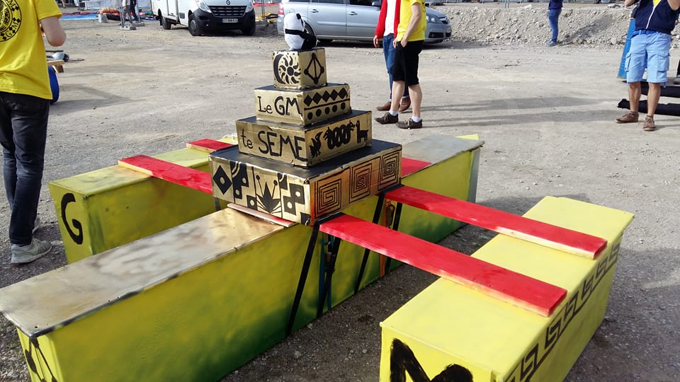 Bateau de l'EEIGM aux Aquacité 2017 [Thème : Les mayas]